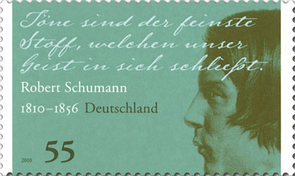 Stamp description / Briefmarkenbeschreibung